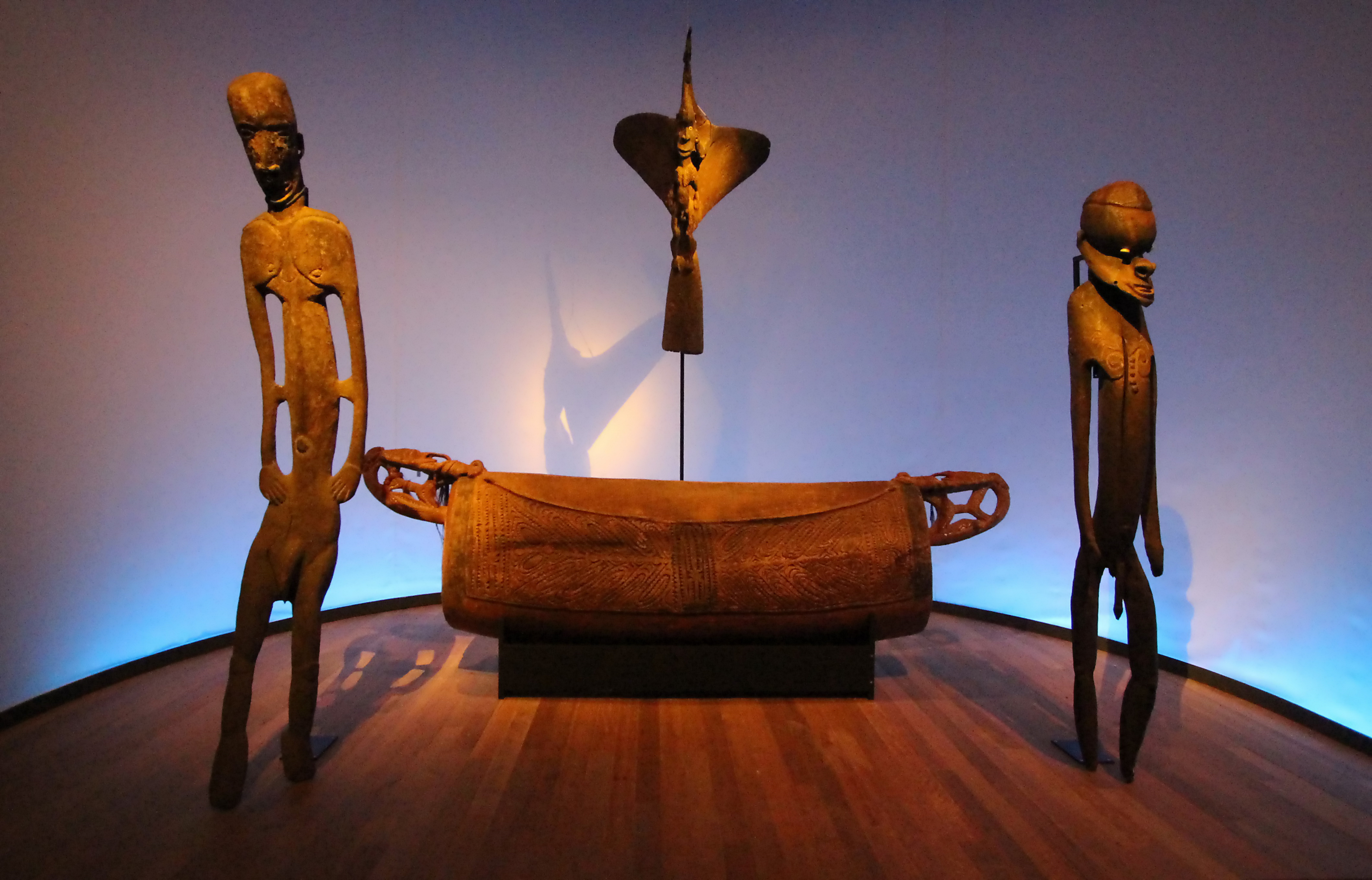 world museum rotterdam in 2014 (70)